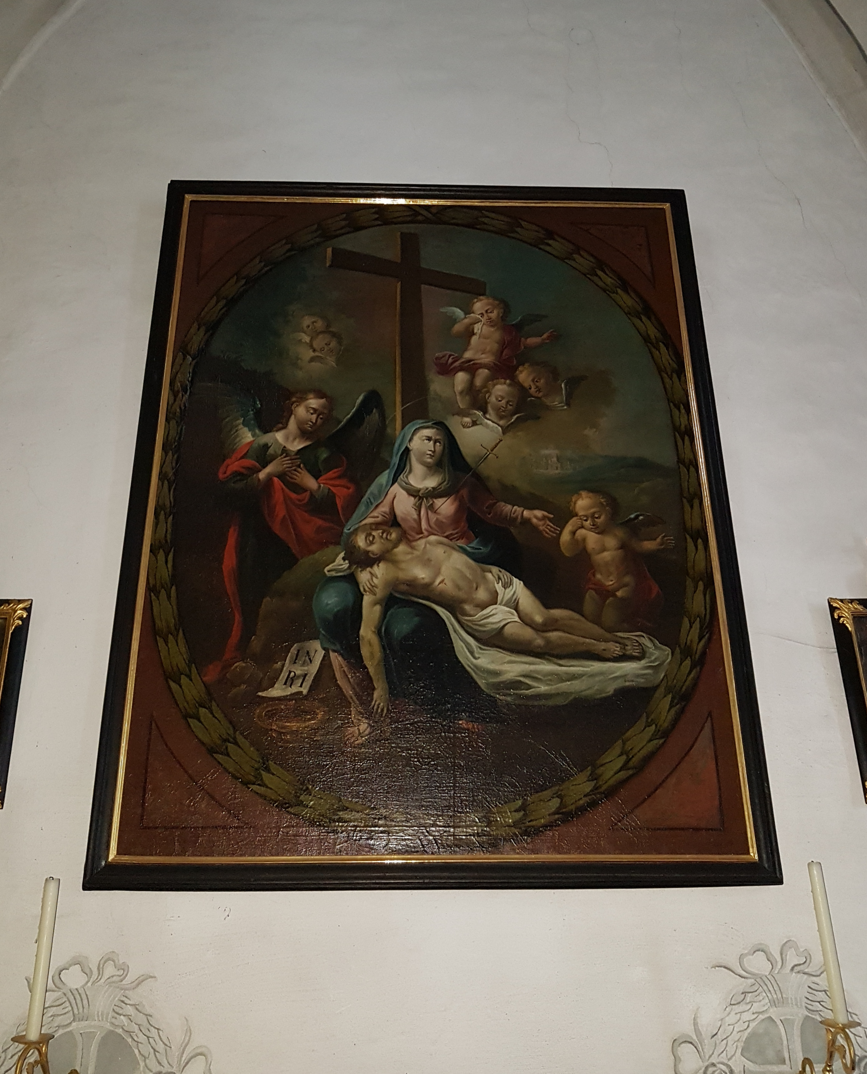 Friedhofskirche St. Nikolaus (Mittenwald)